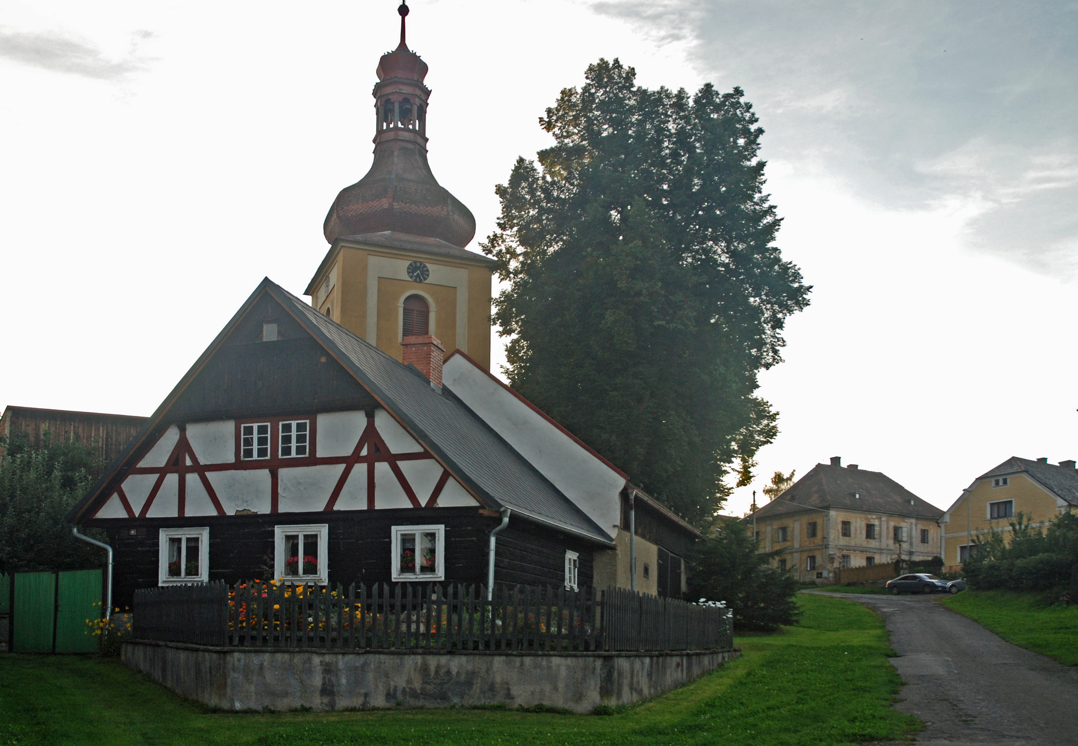 Chodský Újezd